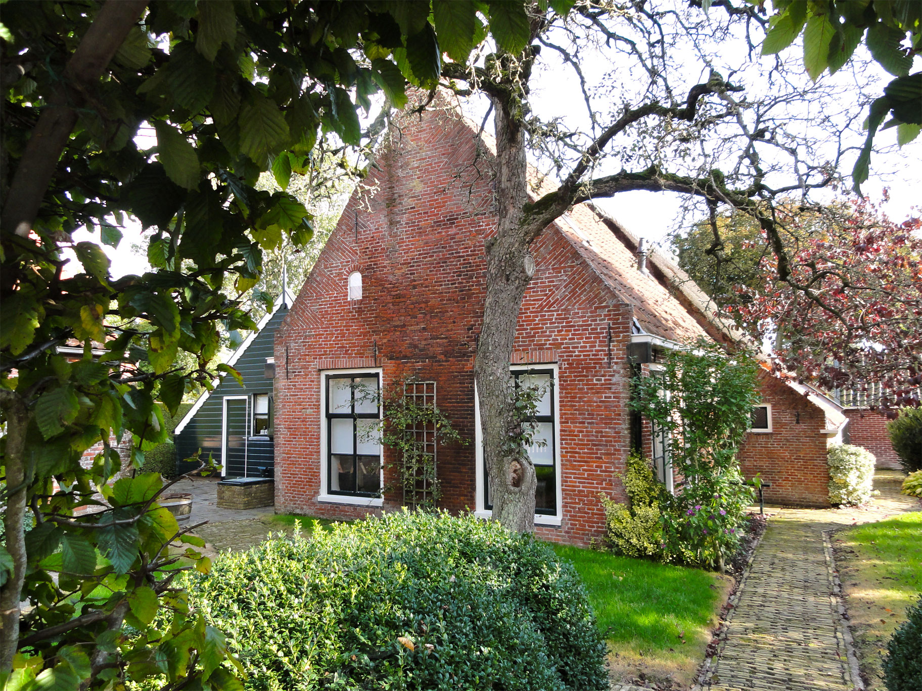 Lytse Loane 16 in Ee